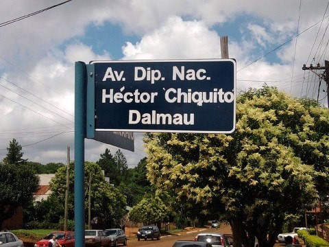 Avenida Diputado Nacional Héctor "Chiquito" Horacio Dalmau en Campo Ramón, Provincia de Misiones, Argentina.